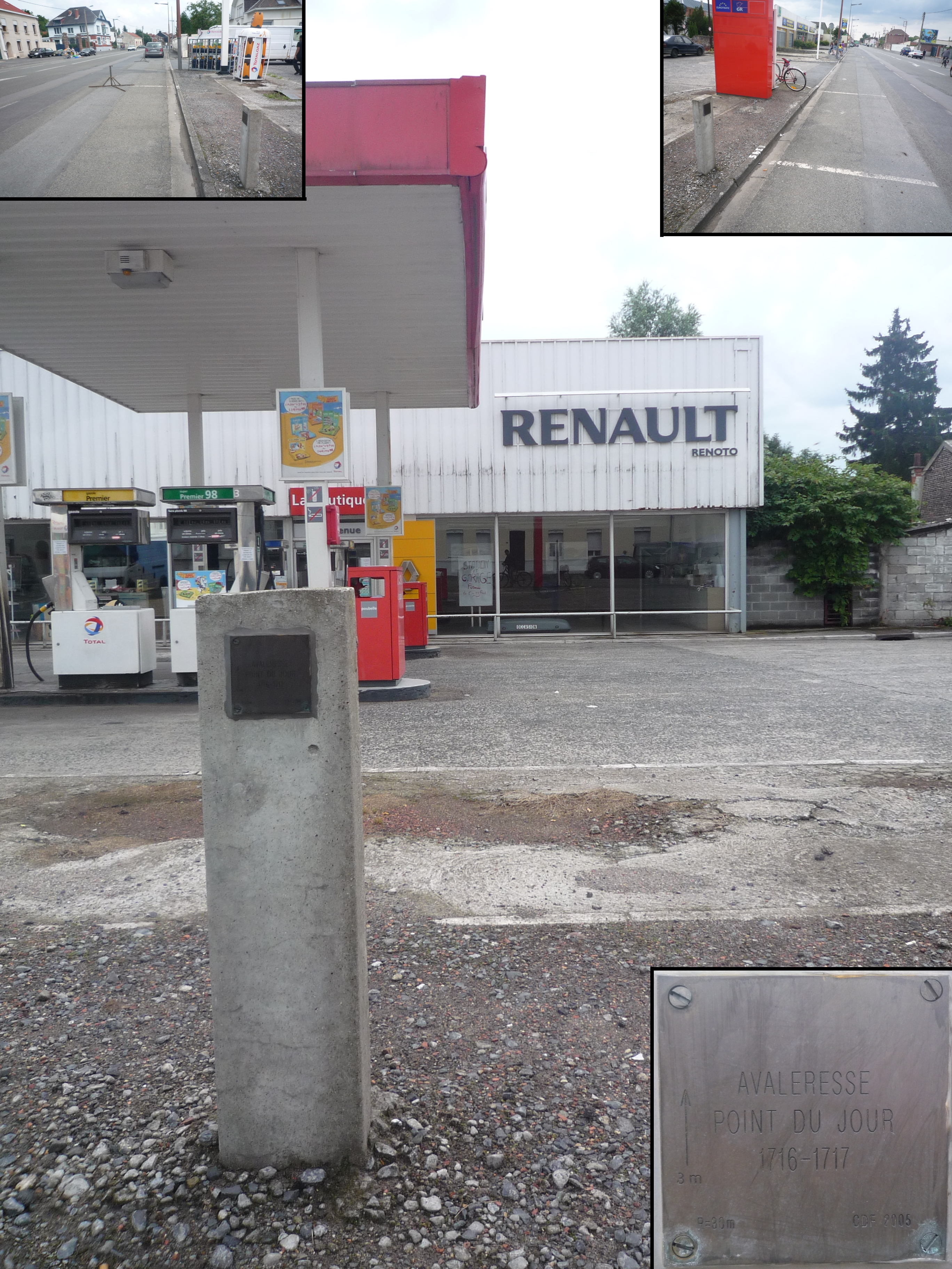 Avaleresse Point du Jour de la Compagnie des mines d'Anzin à Fresnes-sur-Escaut, Nord, Nord-Pas-de-Calais, France.